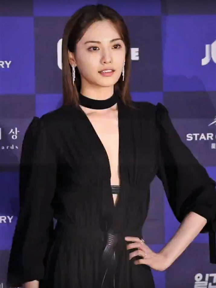 제53회 백상예술대상 레드카펫